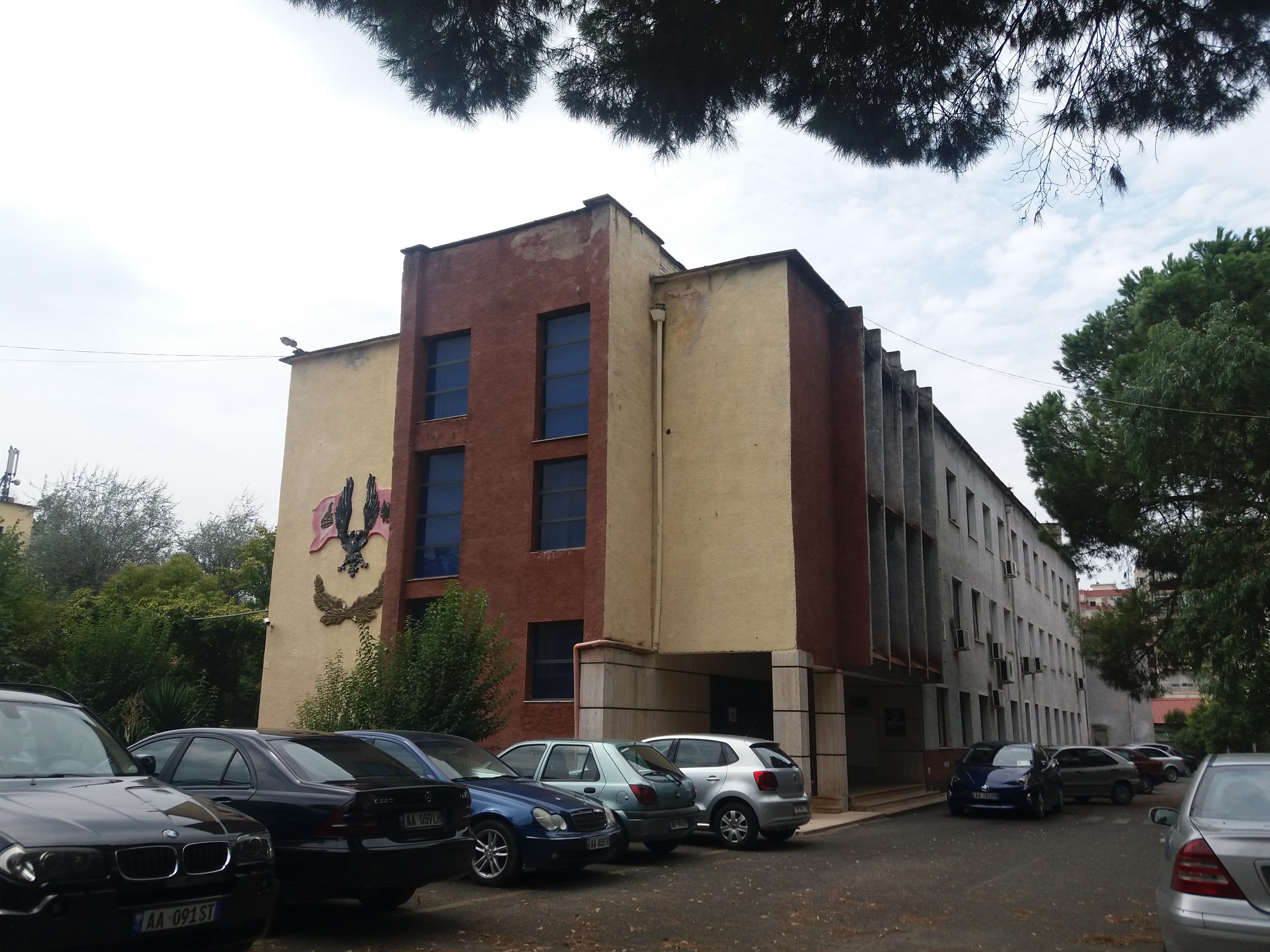 autoriteti per informimin mbi dokumentet e ish sigurimit te shtetit